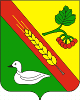 Герб Червоного партизана